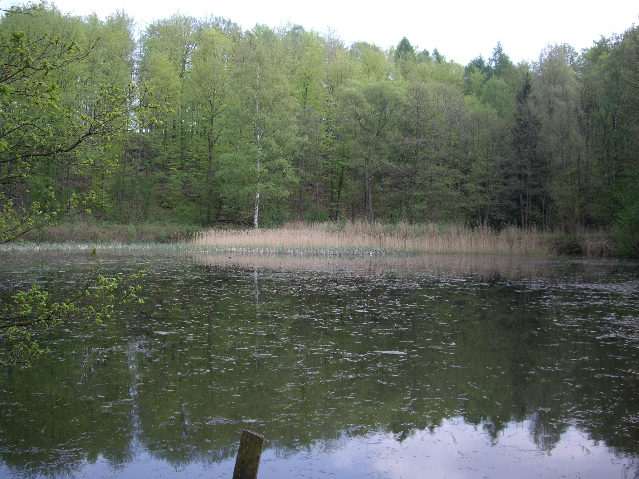 Klusteich bei Hann. Münden, Mai 2012. Foto: F. Welter-Schultes